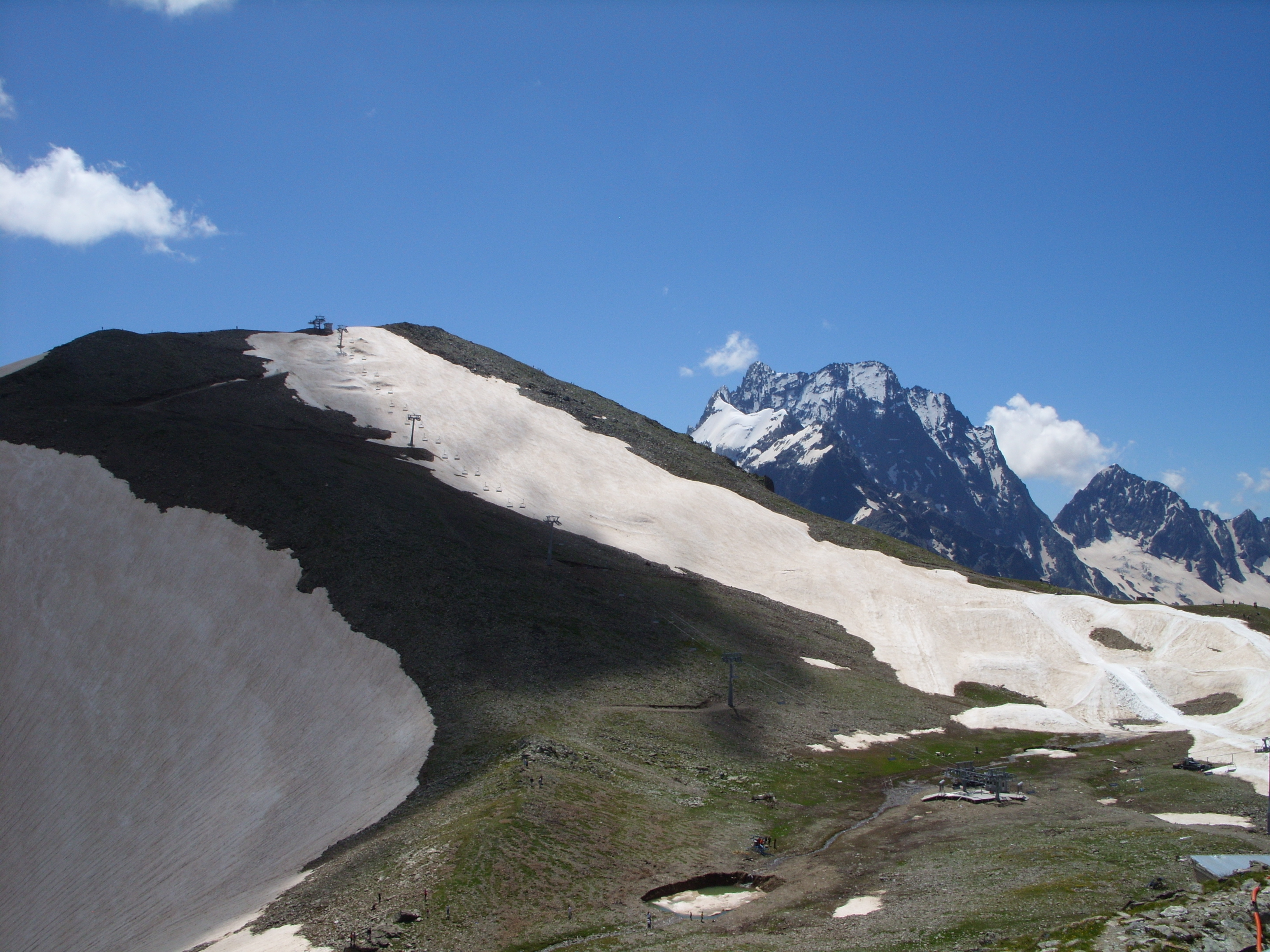 Экскурсия в Домбай из Железноводска, июль 2009 г.